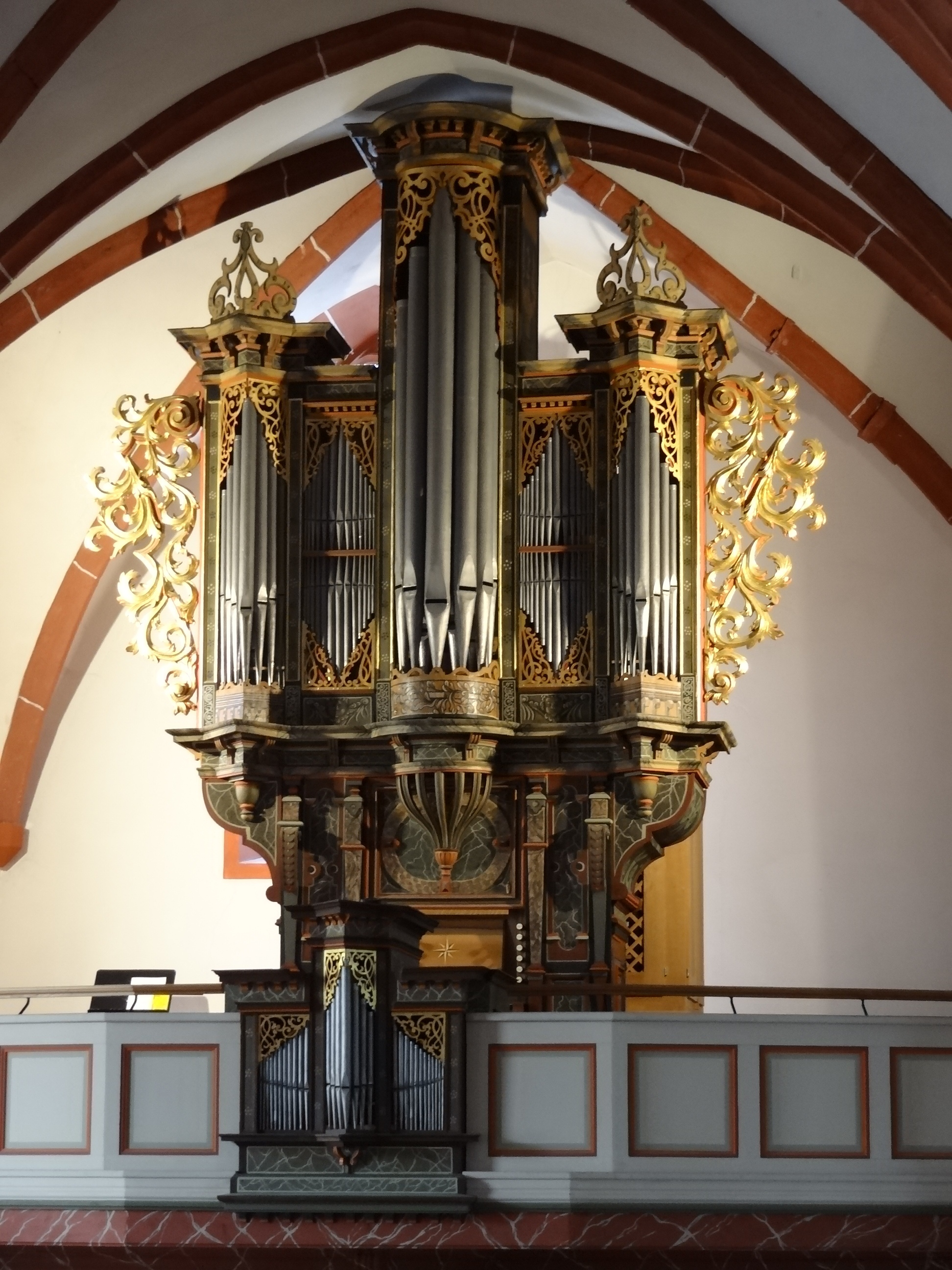 Orgel, Markuskirche (Butzbach)